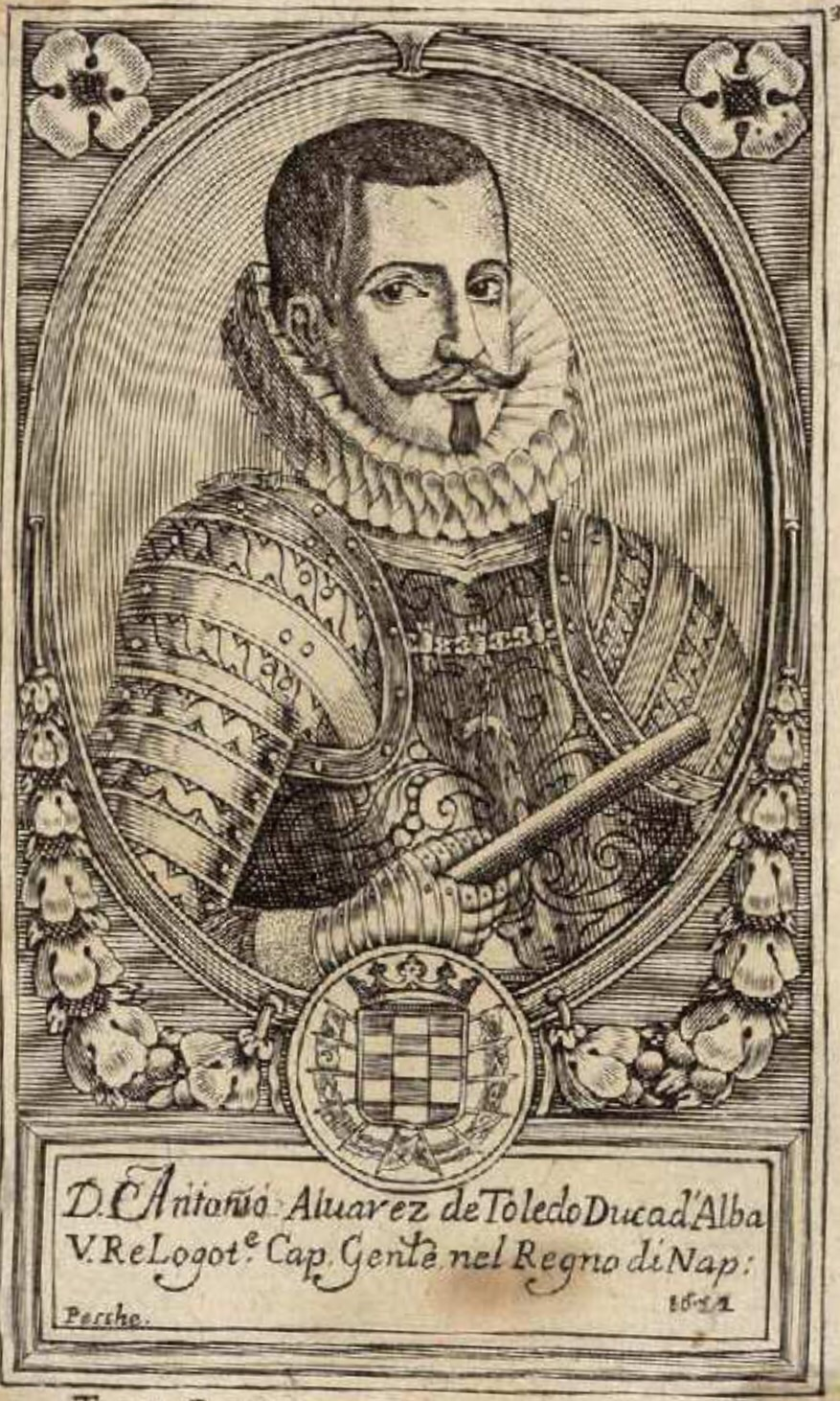 Retrato de Antonio Álvarez de Toledo Beaumont, V duque de Alba, grande de España y Virrey de Nápoles, recogido en el libro Teatro eroico, e politico de governi di Vicere del Regno di Napoli Dal tempo del Re Ferdinando il Cattolico Fino al presente, publicado por Domenico Antonio Parrino (1694)